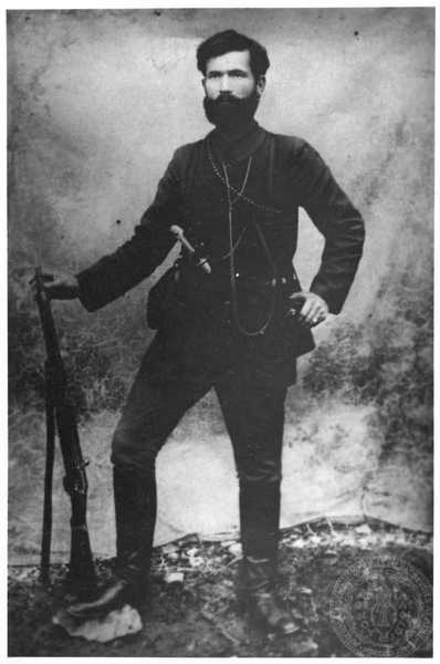 Деецът на ВМОРО от Вишени Ромпапов.